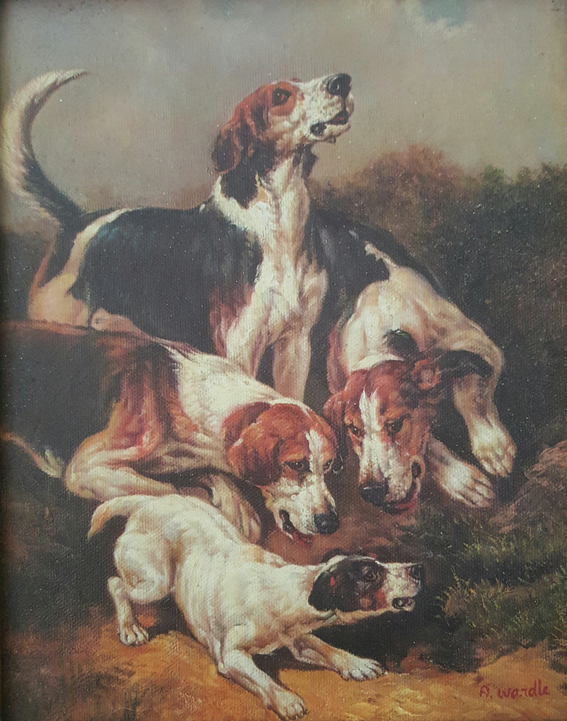 Arthur Wardle Hunting dogs" private collection 19 x 24 cm